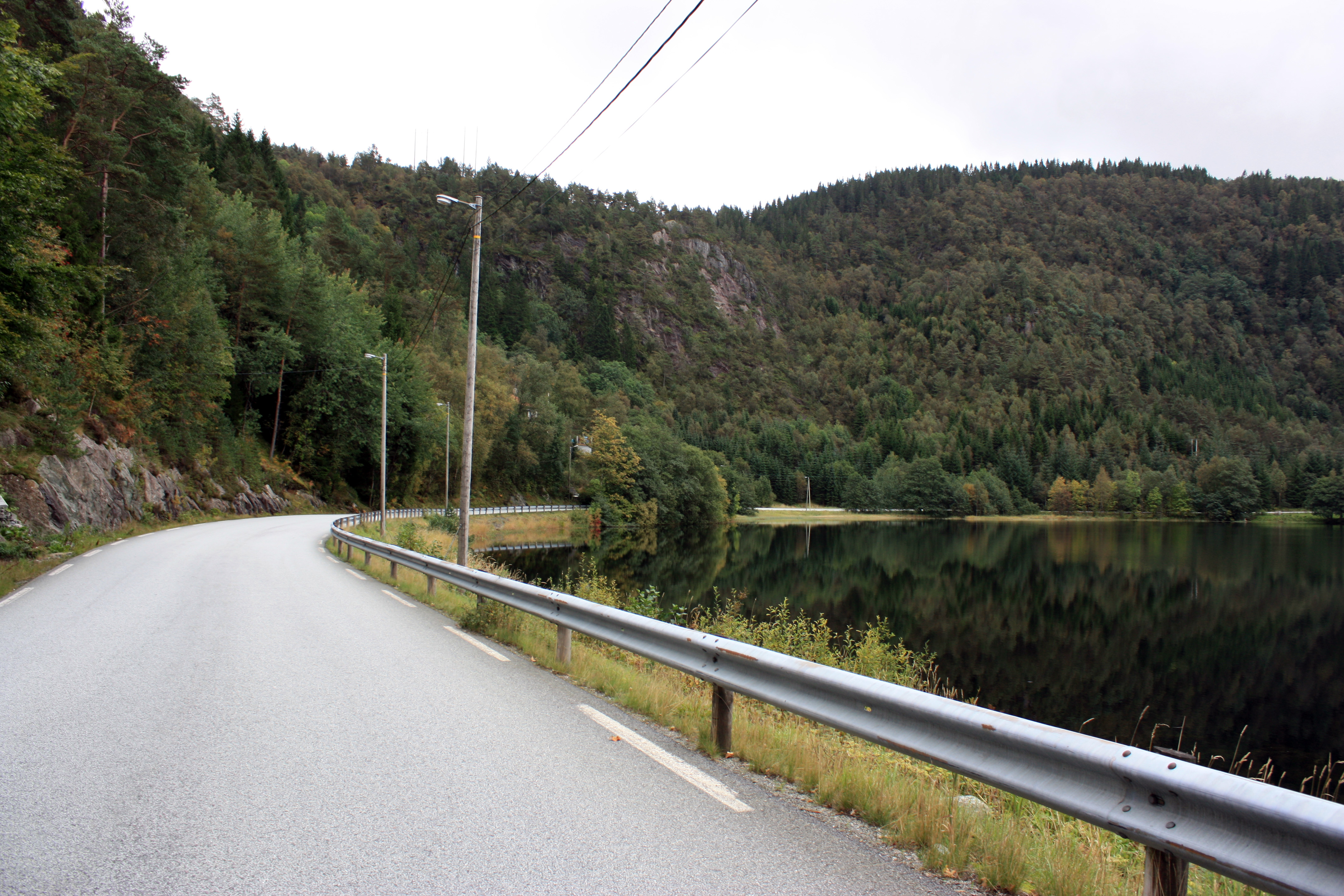 Hamrevegen, Fana, Bergen.